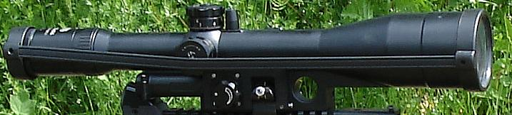 Zielfernrohr 3-12 x 56 SSG von Carl Zeiss Optronics Wetzlar GmbH für das G22. Unter dem ZF (linke Seite) sitzt das Notvisier